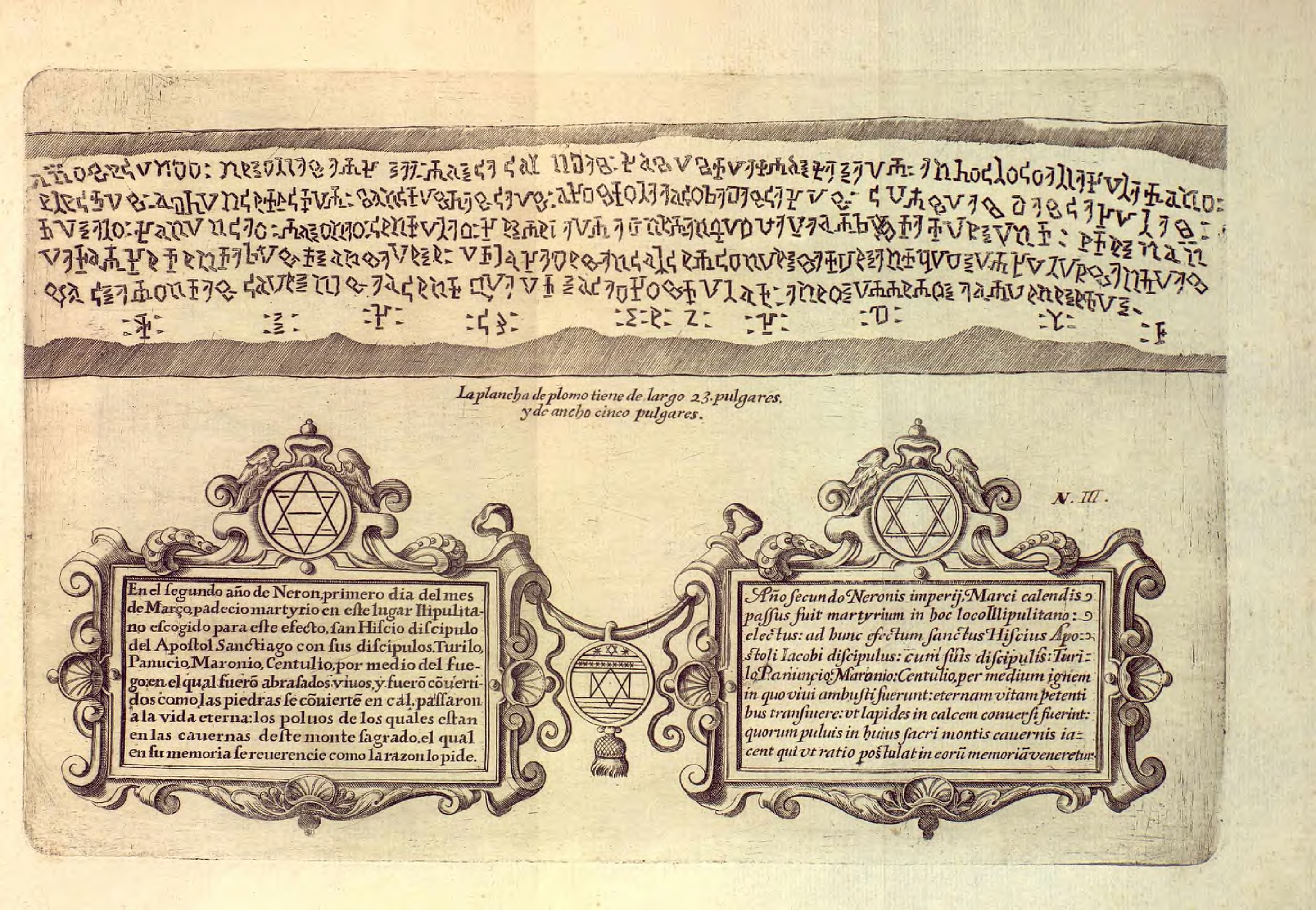 Diego Nicolás Heredia Barnuevo, Mystico ramillete historico, chronologyco, panegyrico, texido de las tres fragrantes flores del nobilissimo antiguo origen, exemplarissima vida, y meritissima fama posthuma del Ambrosio de Granada ... el Illmo. y V.Sr. Don Pedro de Castro, Vaca y Quiñones ... Arzobispo de Granada, y Sevilla, y Fundador Magnifico de la Insigne Iglesia Colegial del Sacro Monte Illipulitano. Impreso en Granada en la Imprenta Real, 1741. Grabados a buril sobre cobre en su mayor parte de Francisco Heylan sobre dibujos de Lucenti aprovechando las planchas creadas para la Historia eclesiástica de Granada de Justino Antolínez que quedó sin publicar. Ejemplar digitalizado de la Universidad de Granada